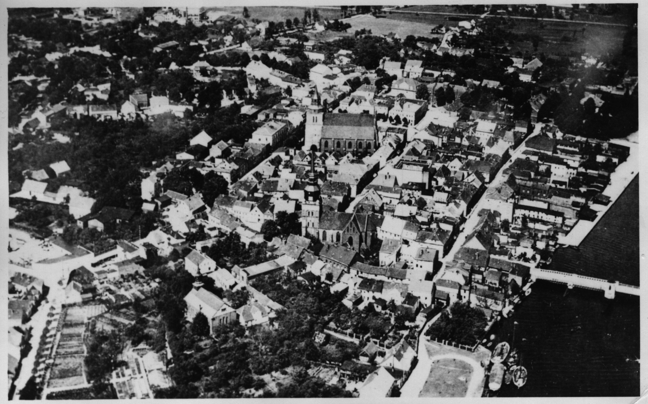 Wolin z lotu ptaka (XX wiek)